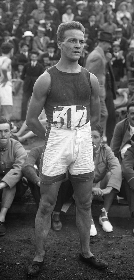 [Portrait de Gaston] Féry [vainqueur du] 400 m [des championnats de France d'athlétisme, le 18/7/20, stade Pershing] : [photographie de presse] / [Agence Rol]